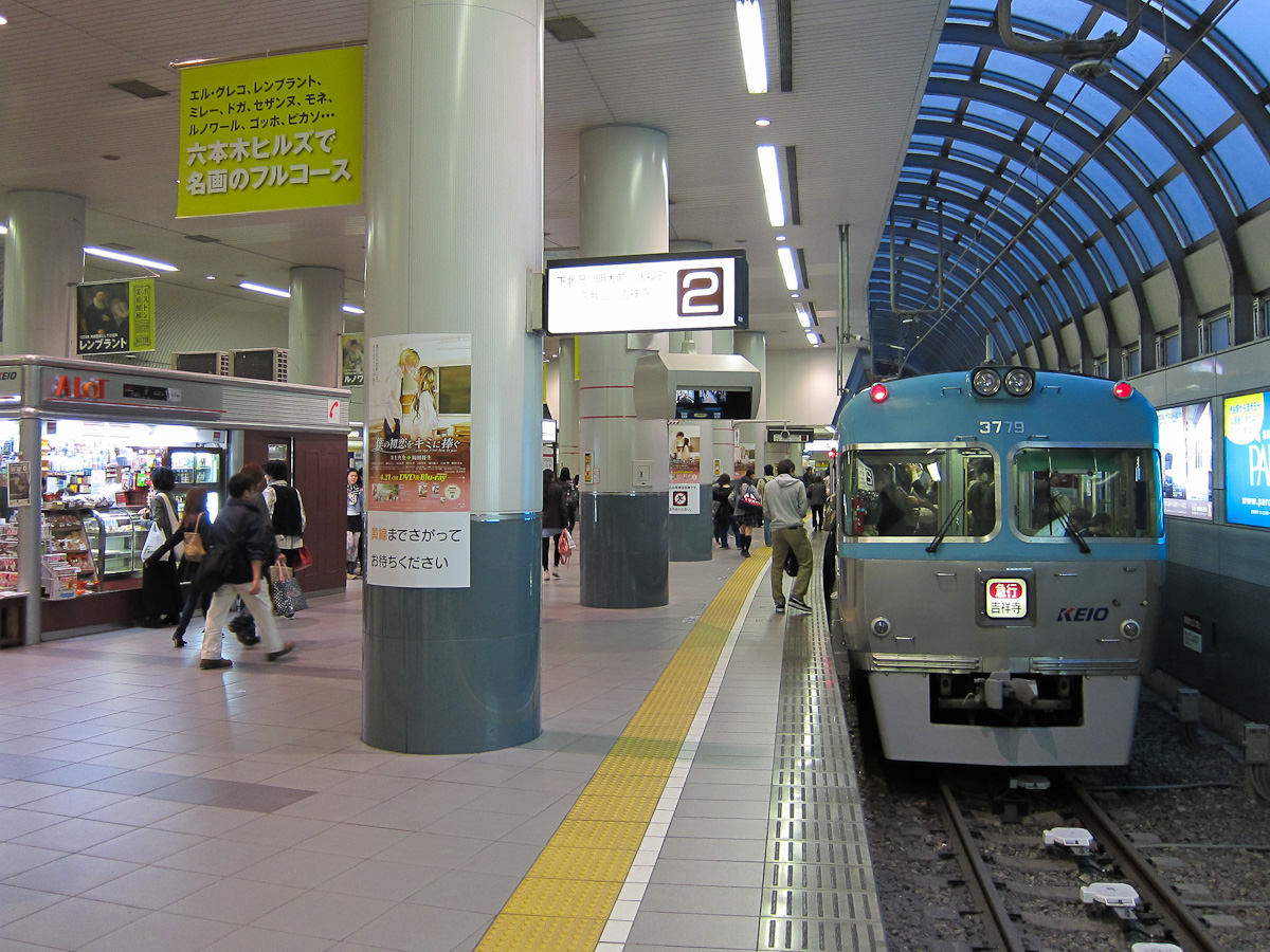 京王電鉄井の頭線渋谷駅。